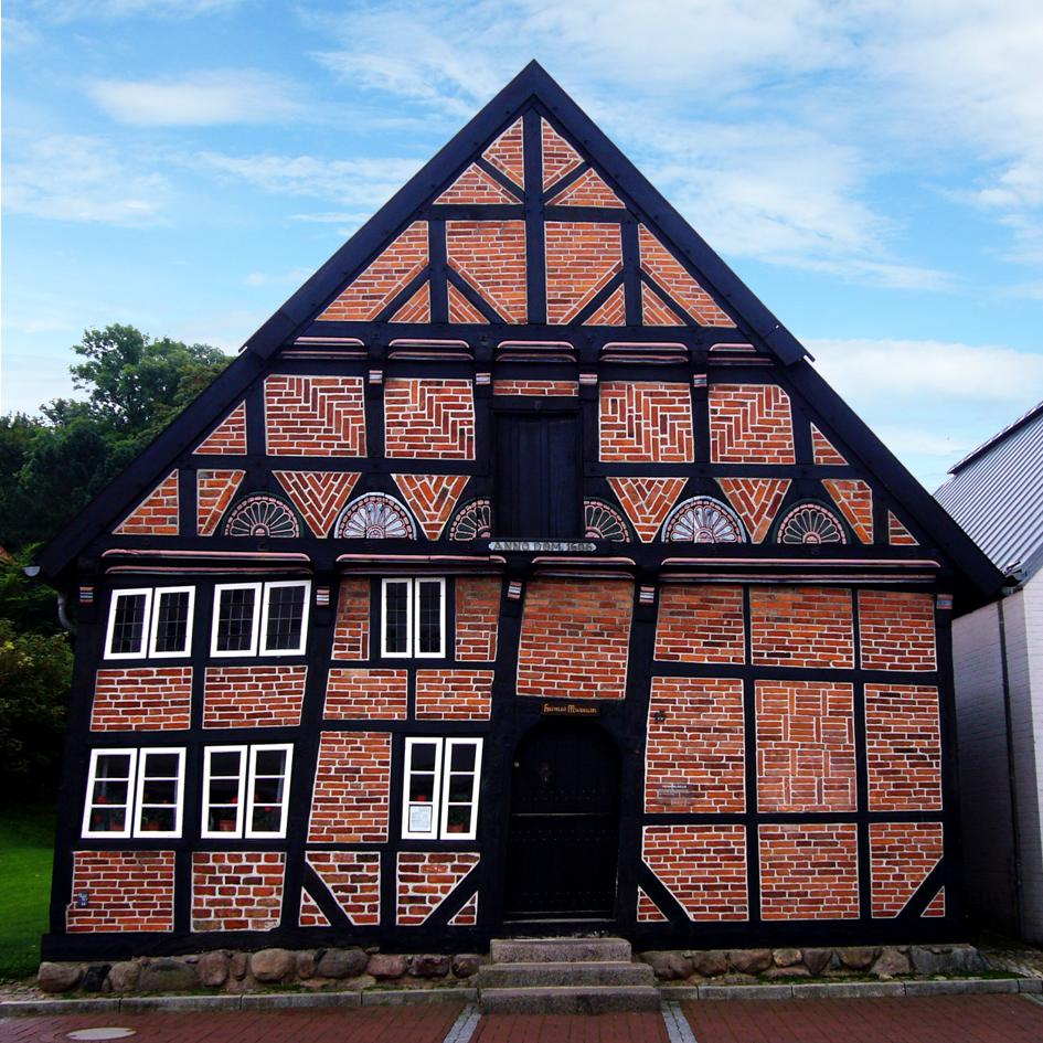 Giebelfassade von 1607/08 des Alt-Segeberger Bürgerhauses nach der Wiederherstellung von 1963/64